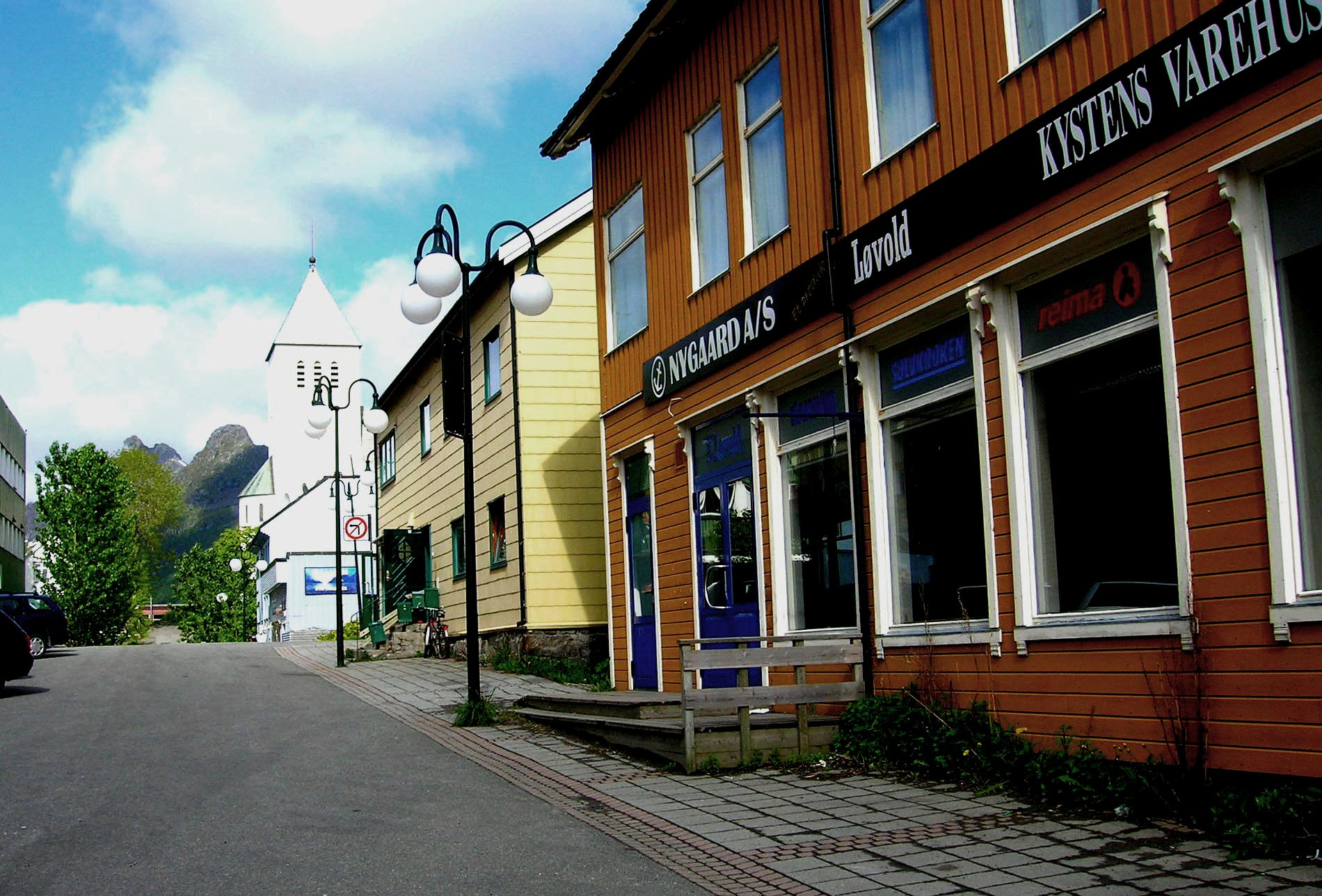 Am Zenter vu Svolvaer